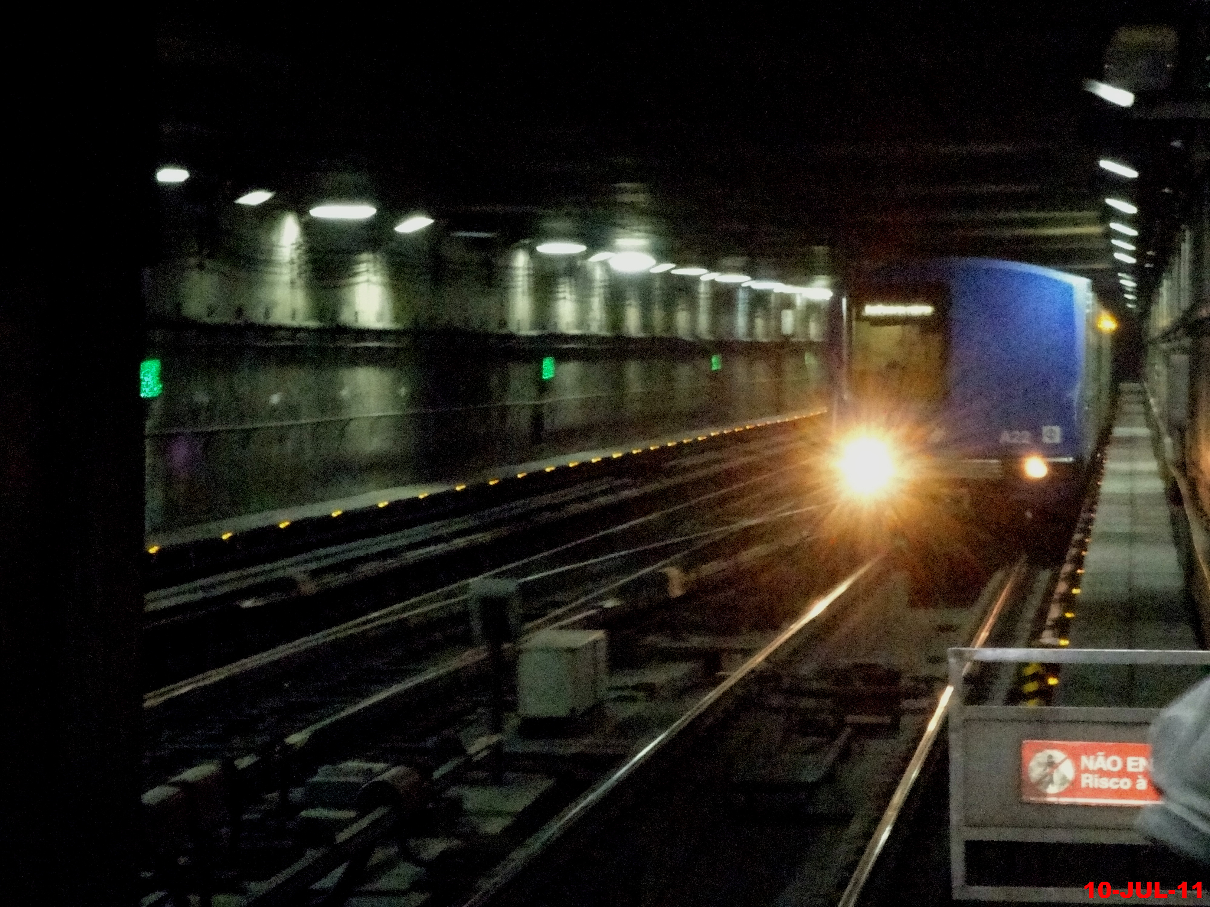 Estação Metrô Jabaquara(Linha 1-Azul). A Estação Jabaquara foi a primeira estação de Metrô do Brasil, inaugurada em Setembro de 1974